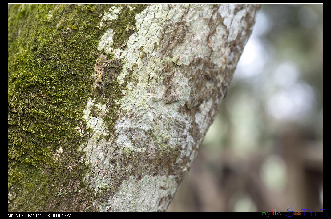 瑟舟蛾 Somera viridifusca viridifusca